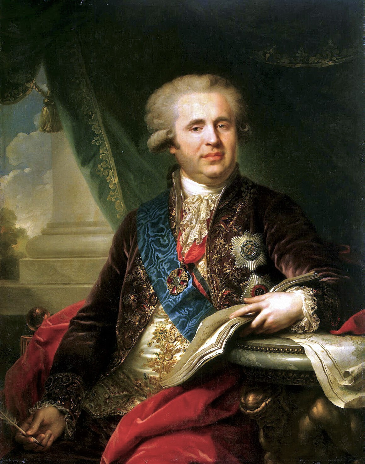 Portrait of Alexander Bezborodko (1747–1799)label QS:Len,"Portrait of Alexander Bezborodko (1747–1799)"label QS:Lru,"И.-Б. Лампи-старший. Портрет князя А.А. Безбородко. 1794"